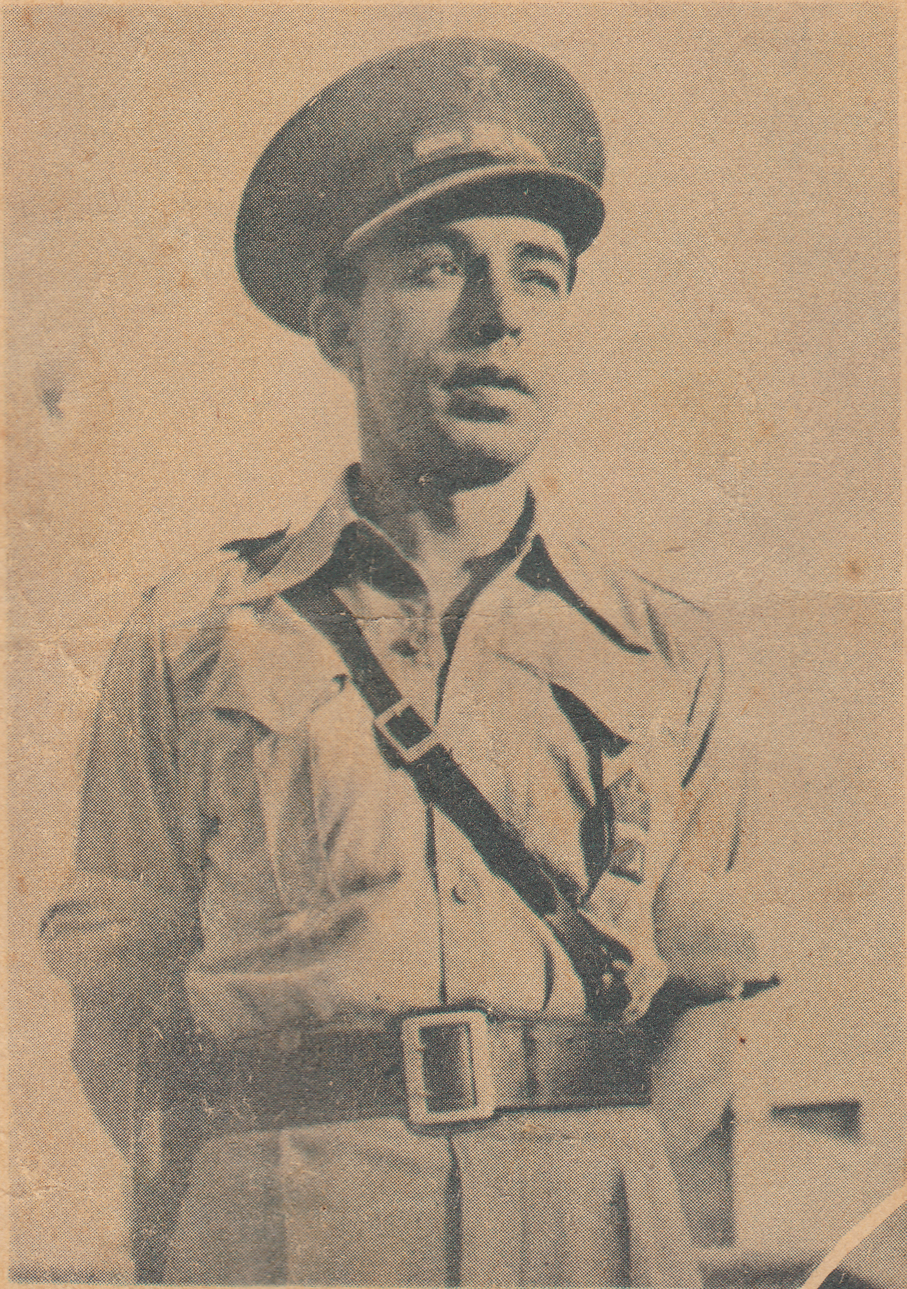 Policarpo Candón Guillén, comandante de milicias del Ejército Popular de la República ESpañola